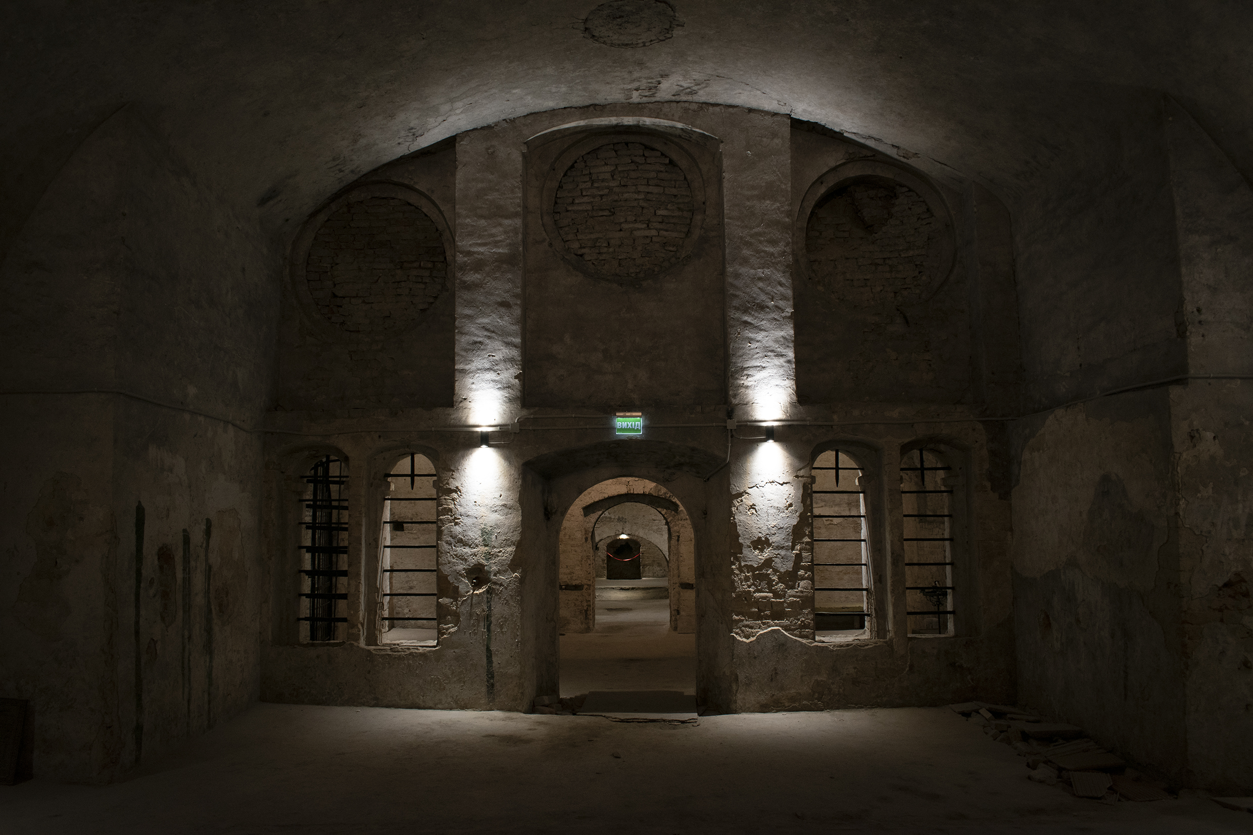 Зимовий костел у підземеллі собору святих Петра і Павла (Луцьк)